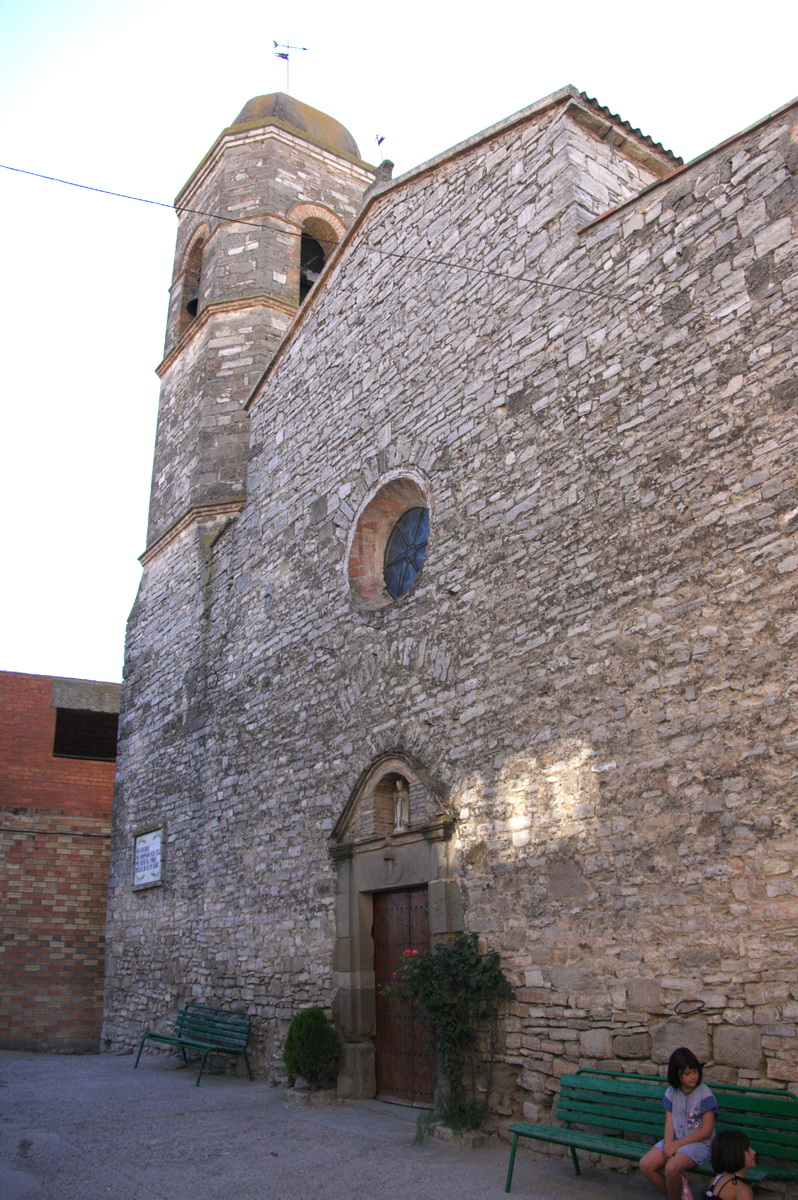 església de Sant Martí a la Tallada (Sant Guim de Freixenet- la Segarra- Catalunya)